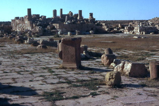 Ruines romaines de Gigthis, Tunisie